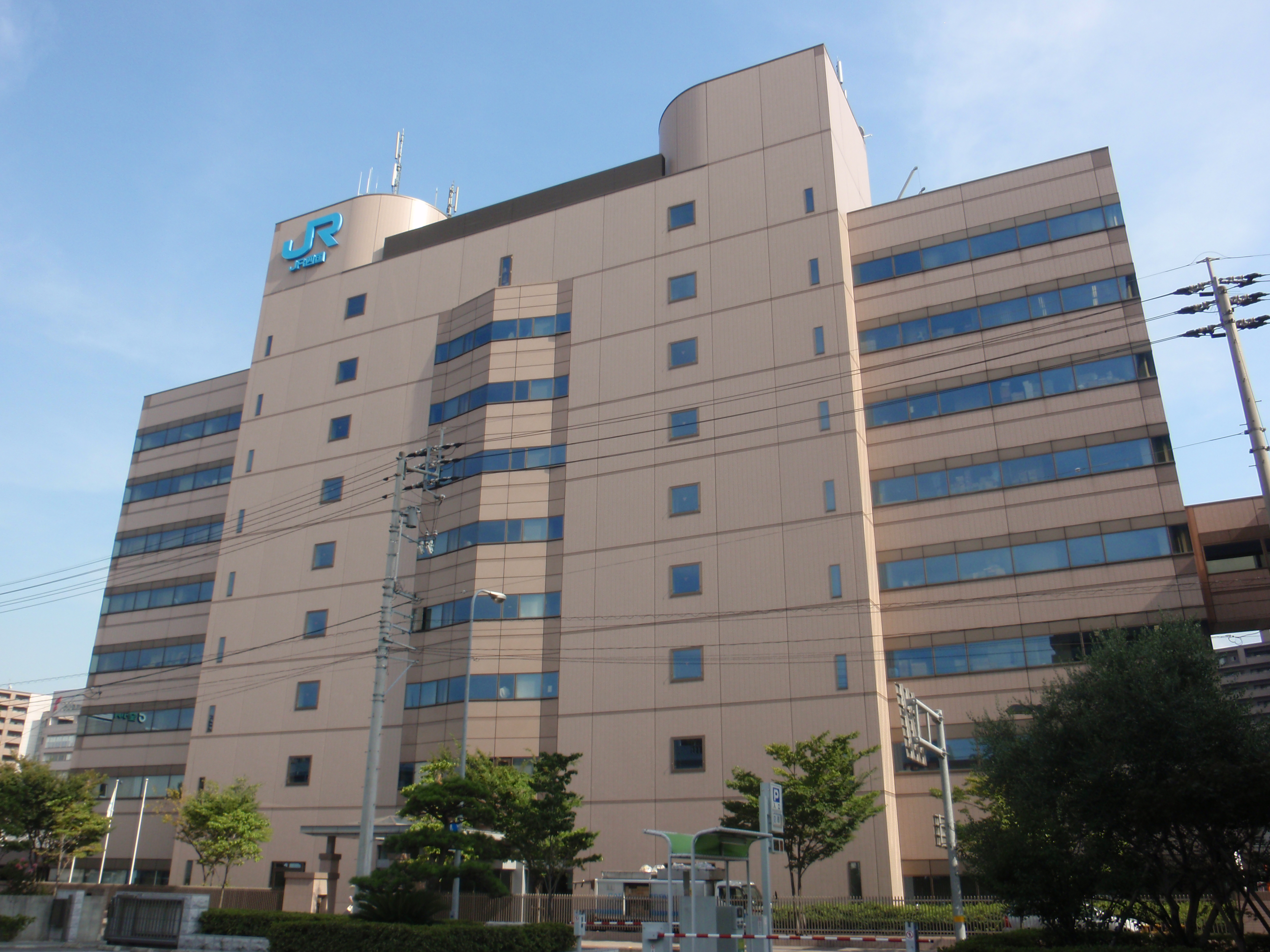 香川県高松市にある四国旅客鉄道（JR四国）本社ビル。